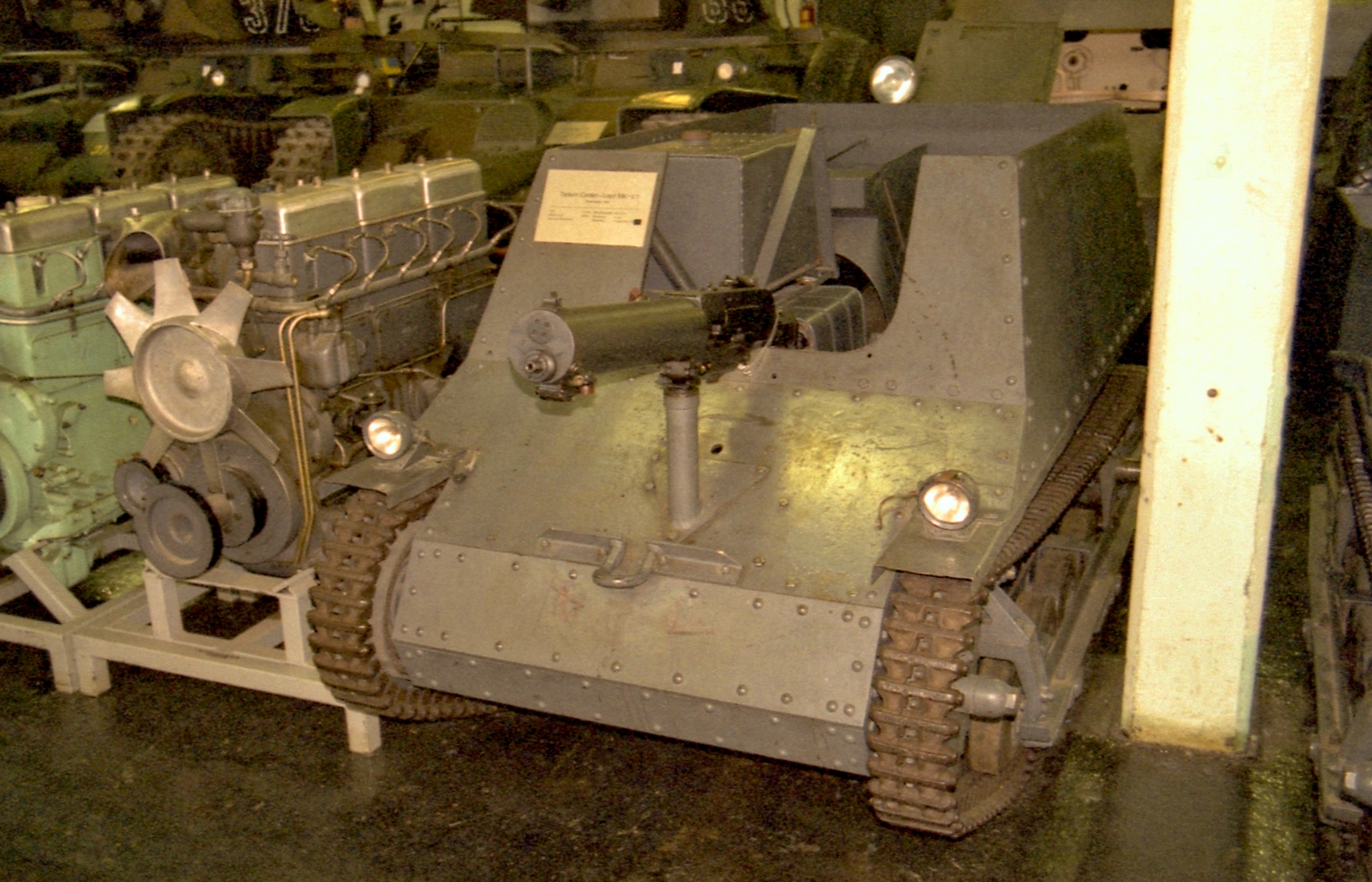 Kleinpanzer (Tankette) Carden-Loyd Mk.V* im Panzermuseum Axvall (Schweden) am 17.August 2003